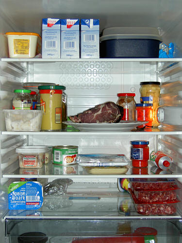 Geöffneter Kühlschrank